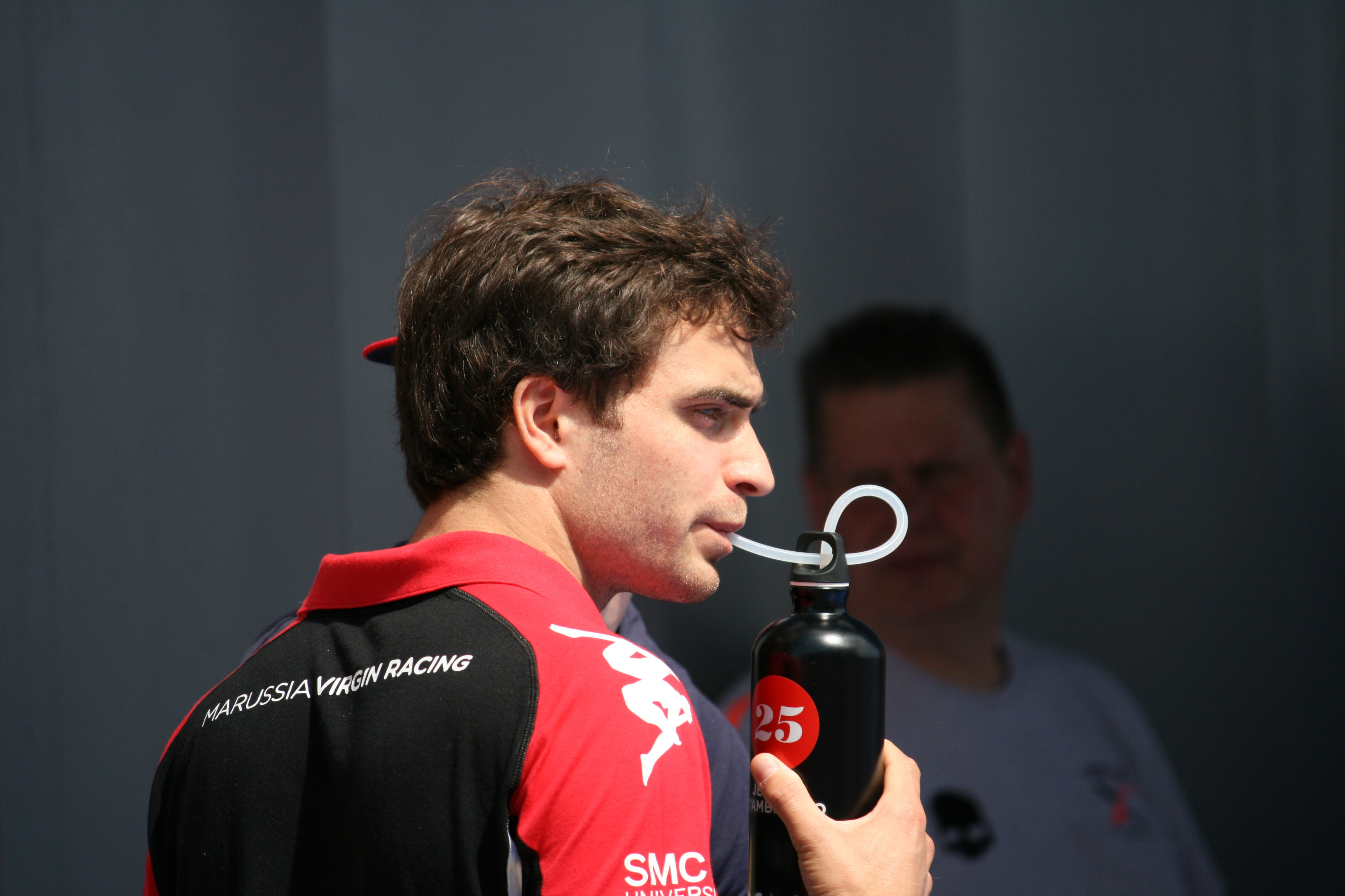 d'Ambrosio